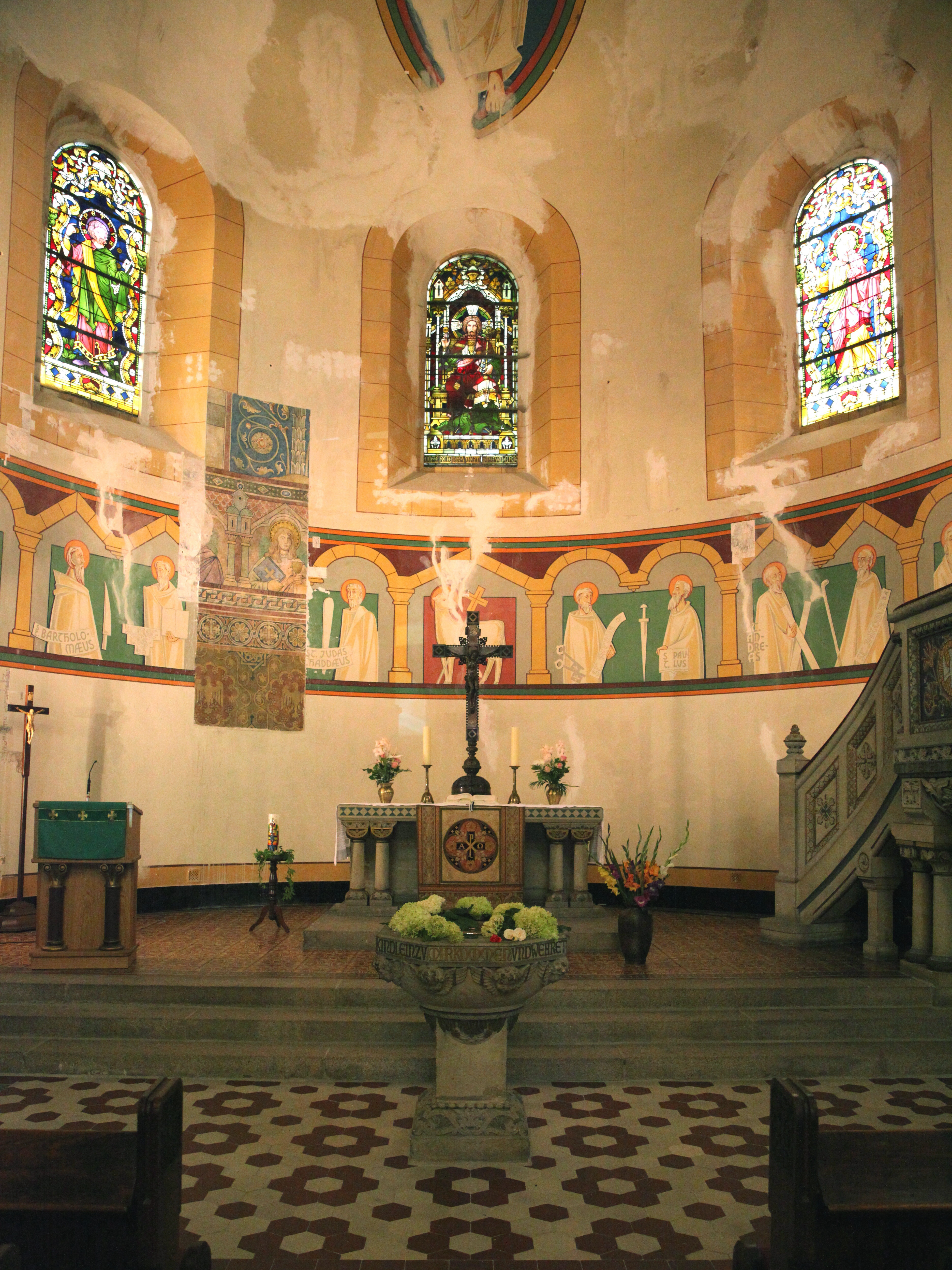 Ev.-luth. Kirche St. Peter und Paul in Steinach in Thüringen